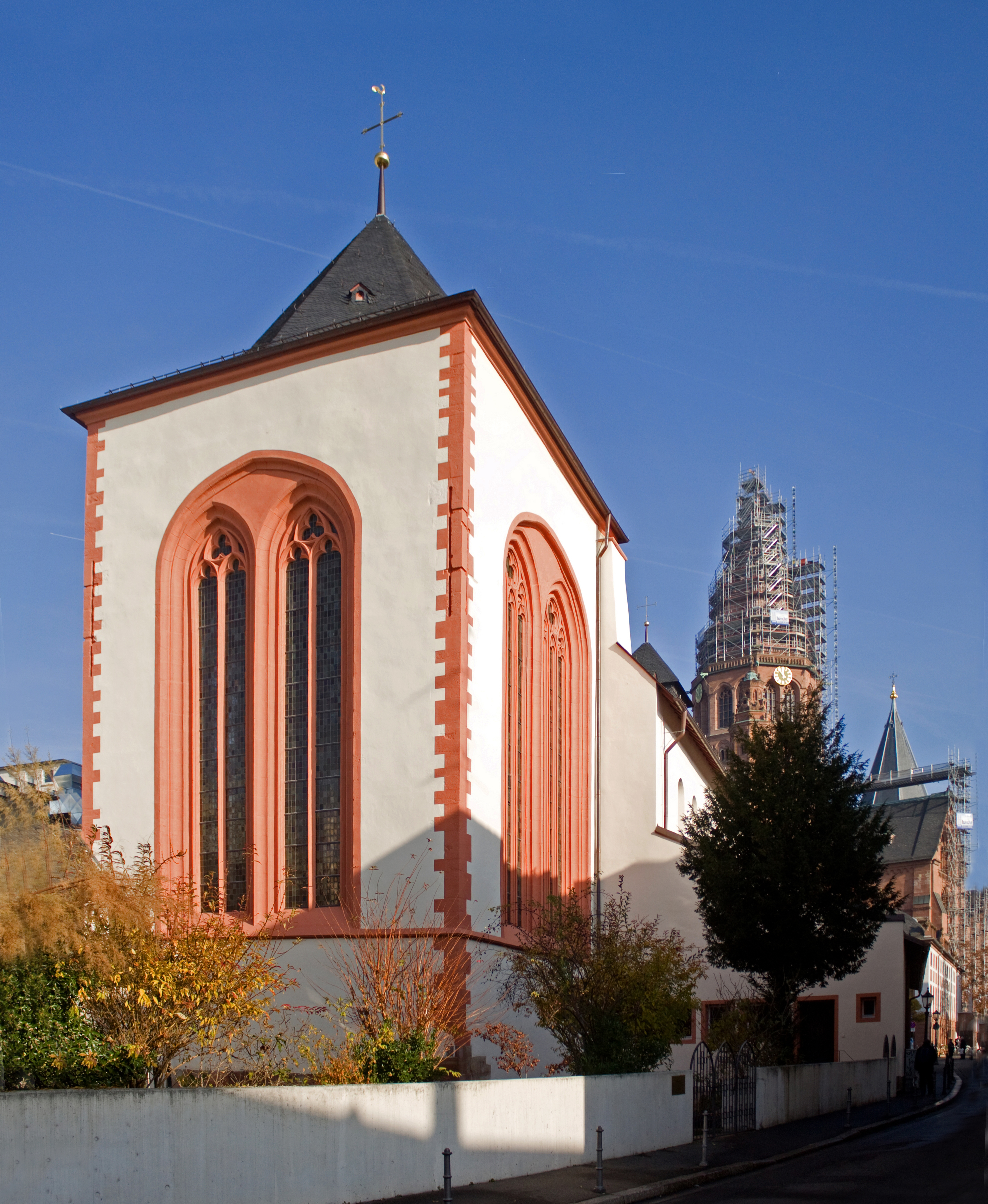 Schöfferstraße 1, Mainz - Evangelische Johanniskirche